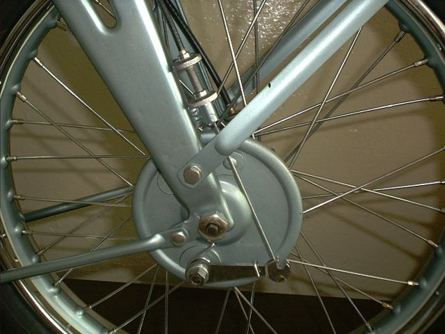 Vorderradtrommelbremse NSU OSL 251, Motorradmuseum Ibbenbüren